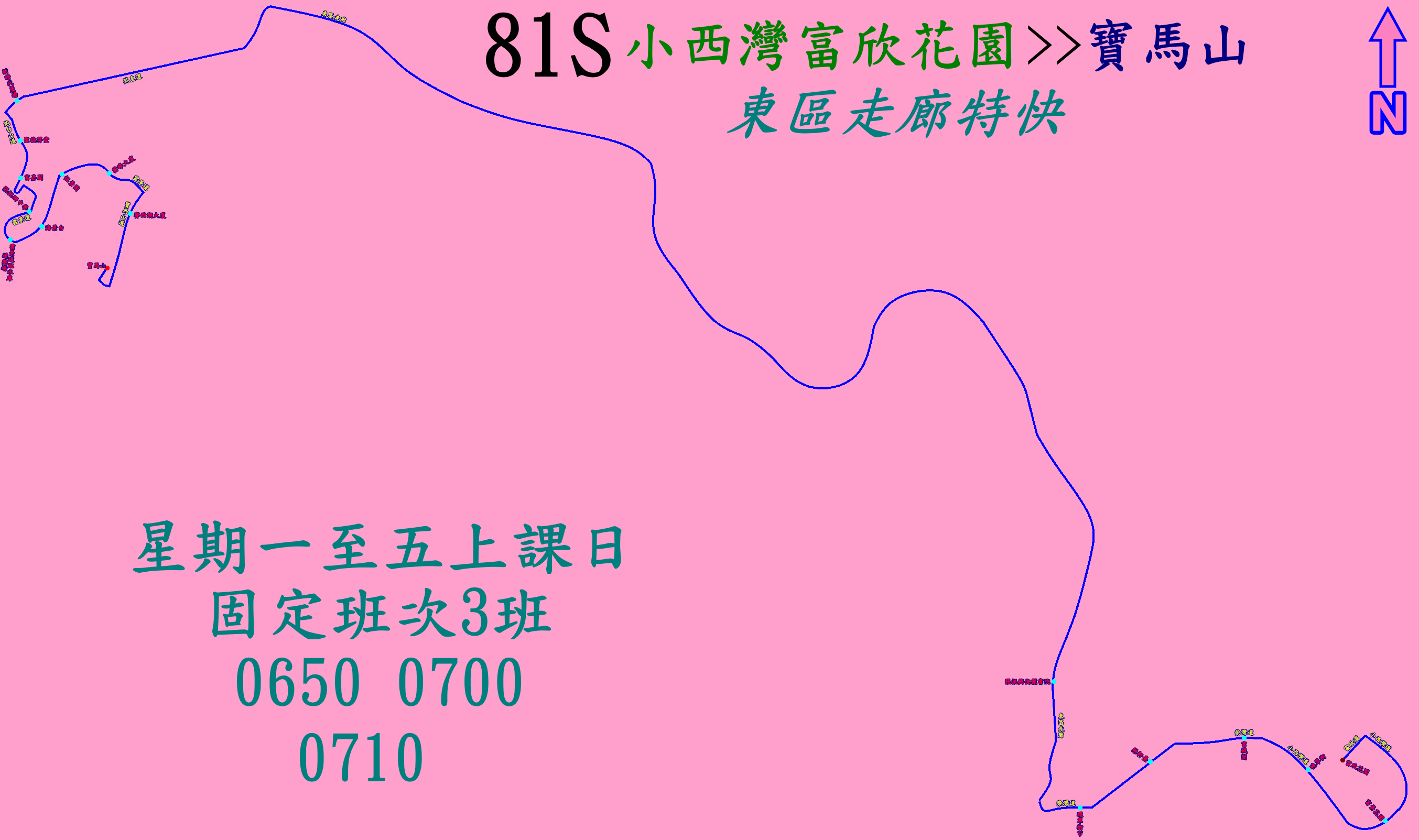 中文（香港）: 新巴81S線的走線圖